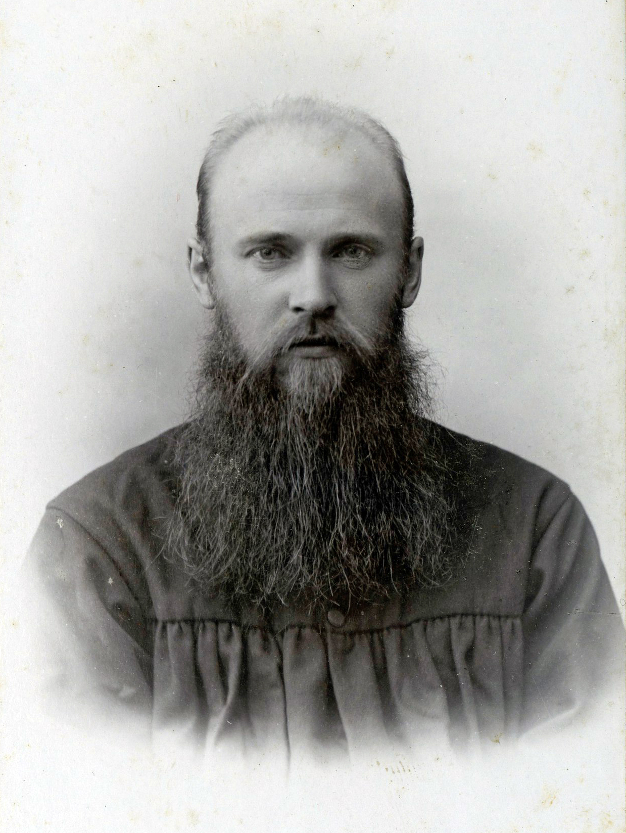 Студент Михаил Александрович Новосёлов Дата снимка: кон. XIX нач. XX в.. Автор фотографии: фотоателье П.Павлова, Москва. Размер листа и изображения: 107х65. Фото архив ЦАКа.